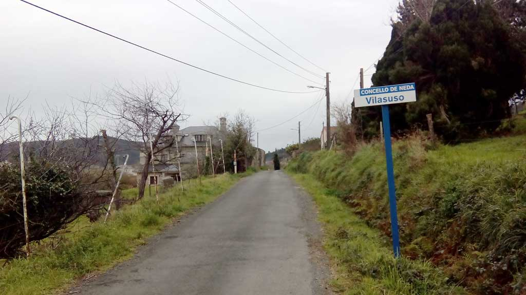 Vista de Vilasuso, Neda.